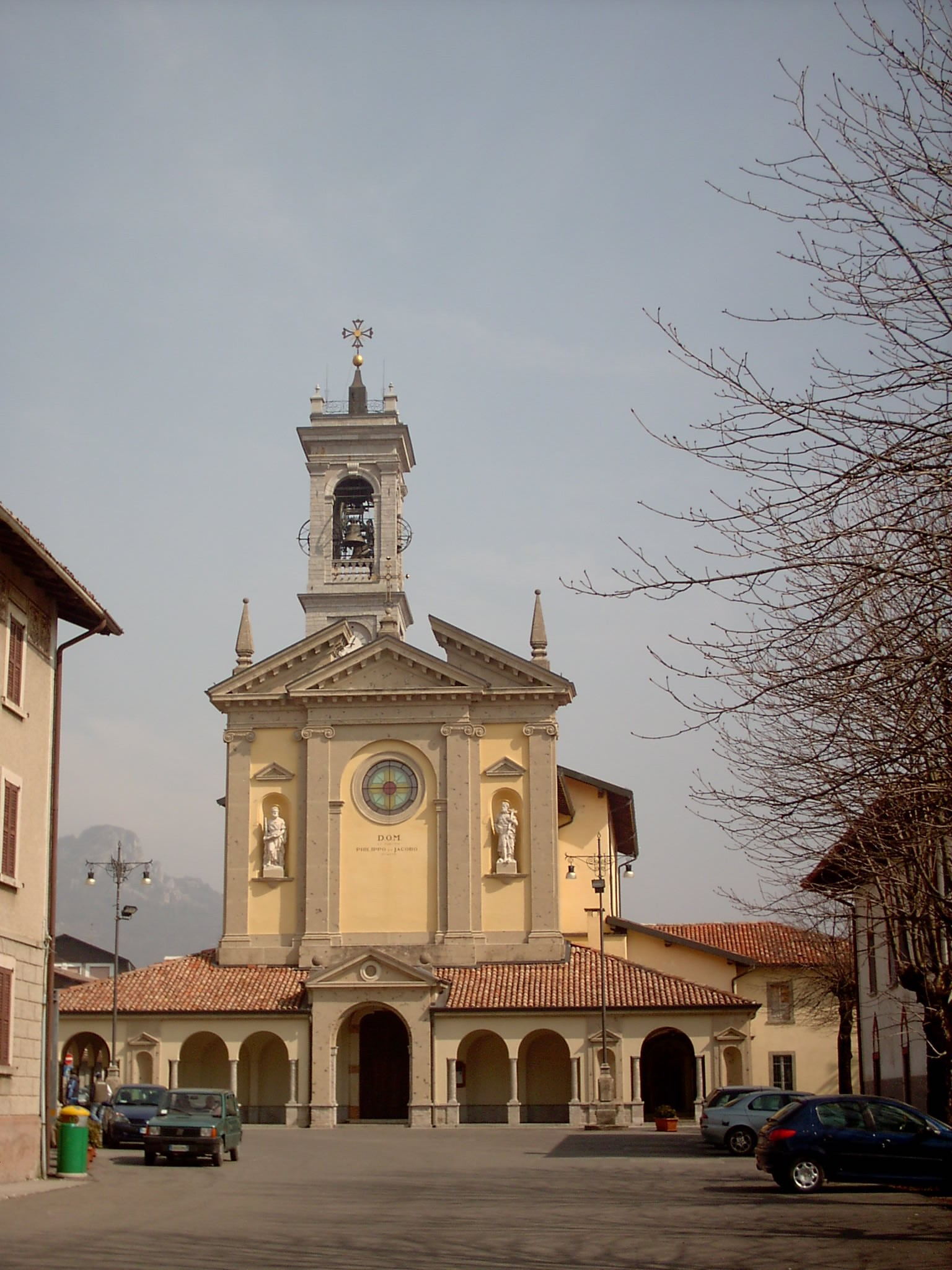 Selvino, Bergamo, Italia